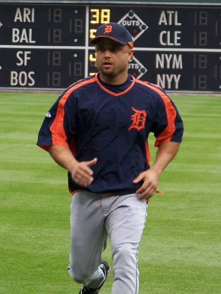 Plácido Polanco